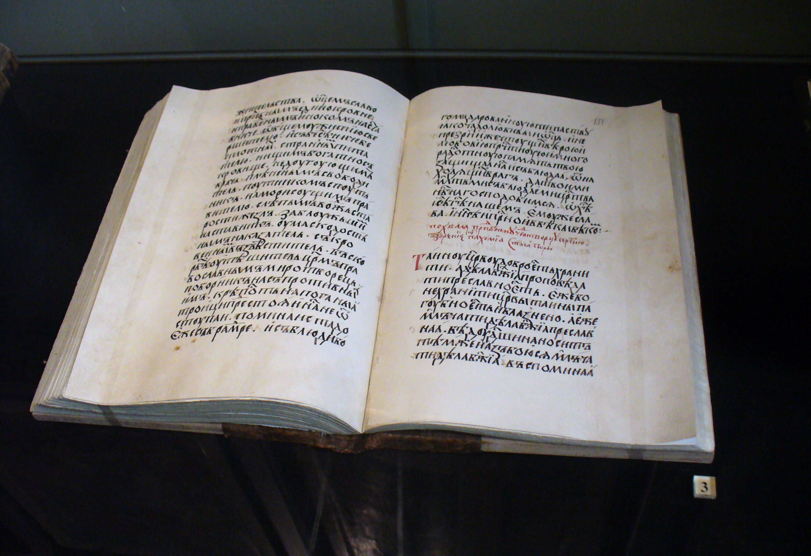 Житие Св. Сергия Радонежского. Список конца 20-х годов XVI века. Бумага, чернила, киноварь; почерк - полуустав; переплёт - доски, кожа. Из Иосифо-Волоколамского монастыря.